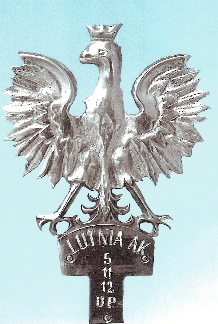 Sztandar Obszaru Lwowskiego AK